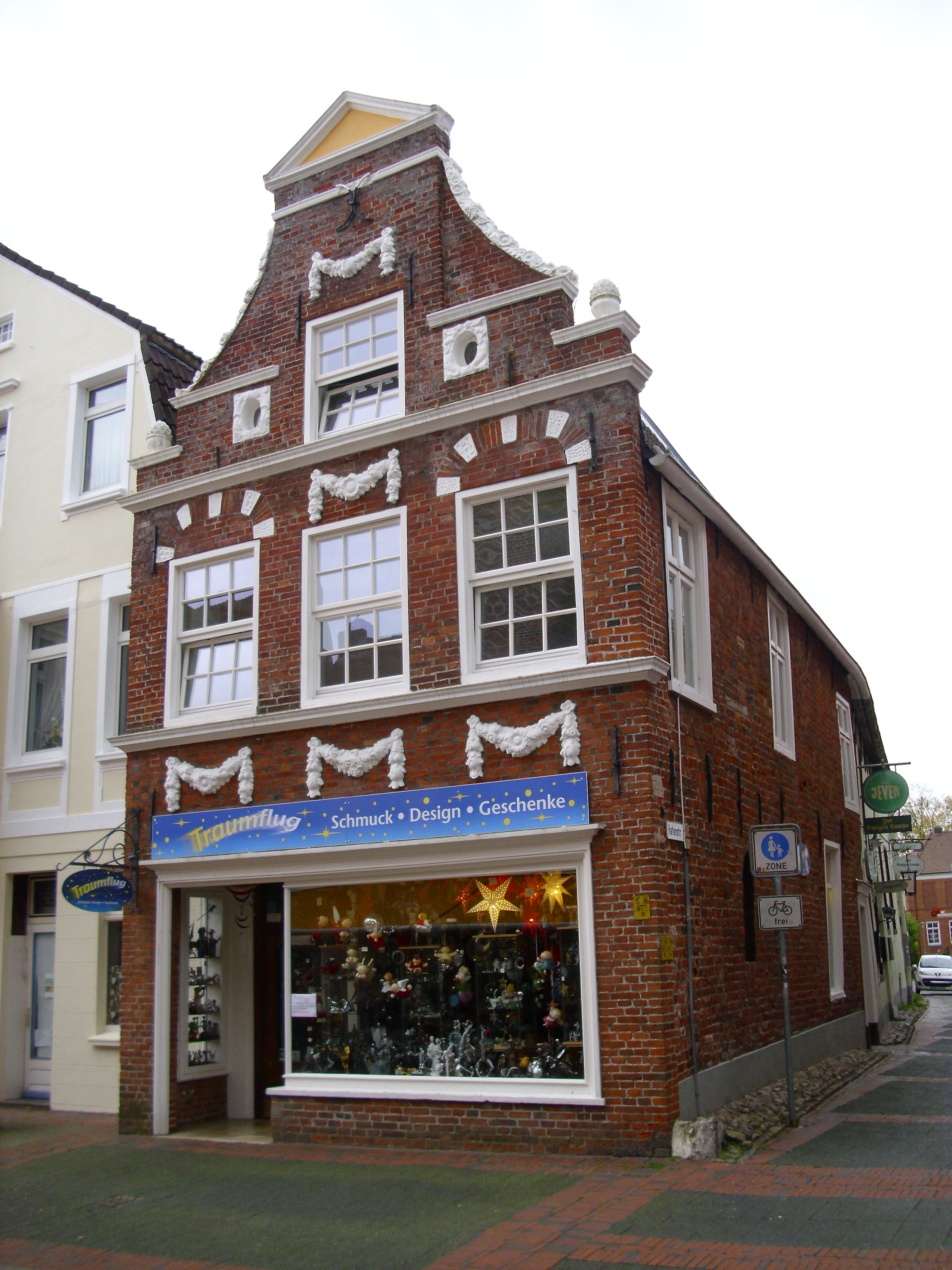 Haus Hanstein, Aurich, Ostfriesland, Burgstraße 33 (September 2015)